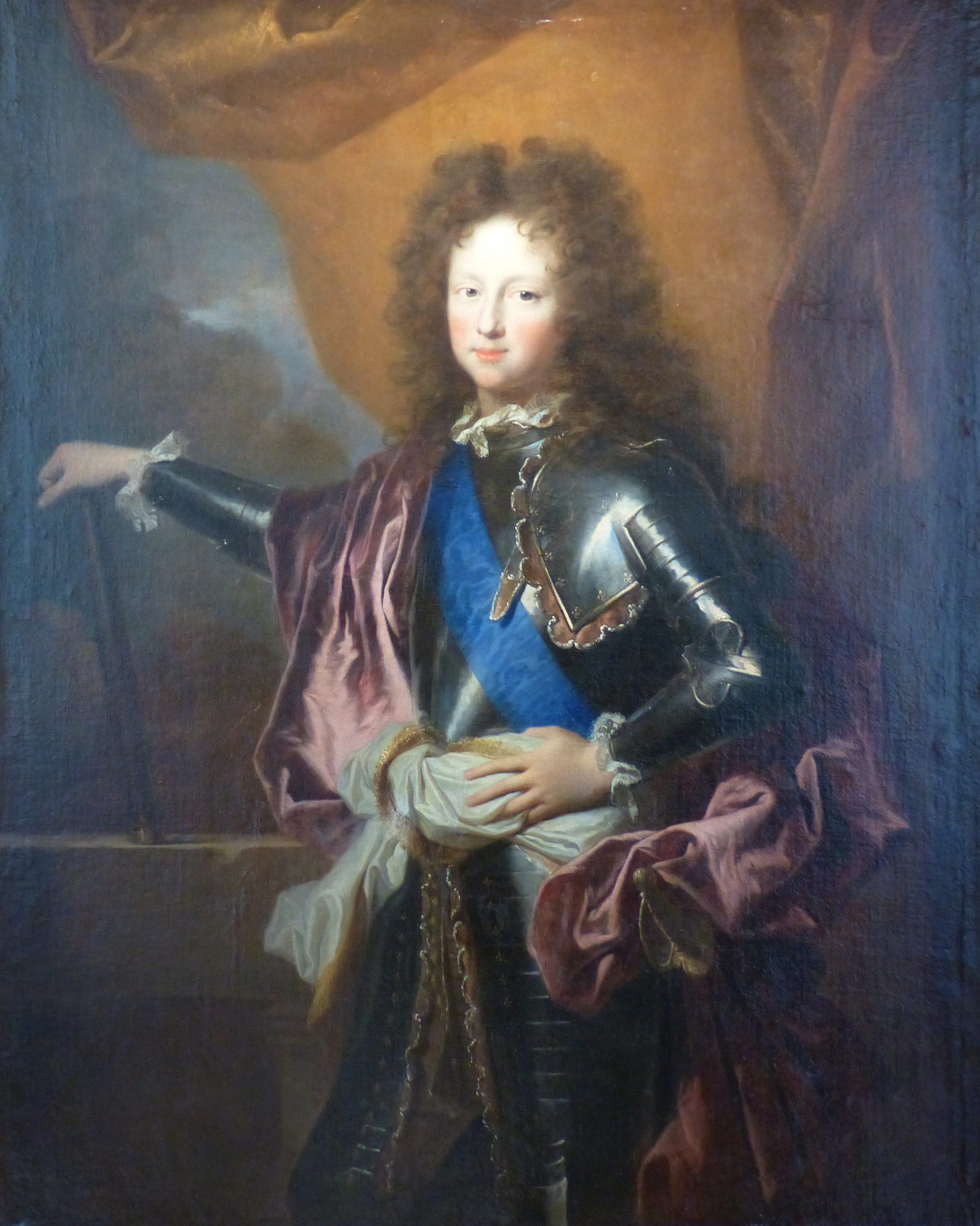 Perpignan (Pyrénées-Orientales, France), musée Hyacinthe Rigaud, collection peinture civile. Philippe d'Orléans (1674-1723), futur régent durant la minorité de Louis XV.